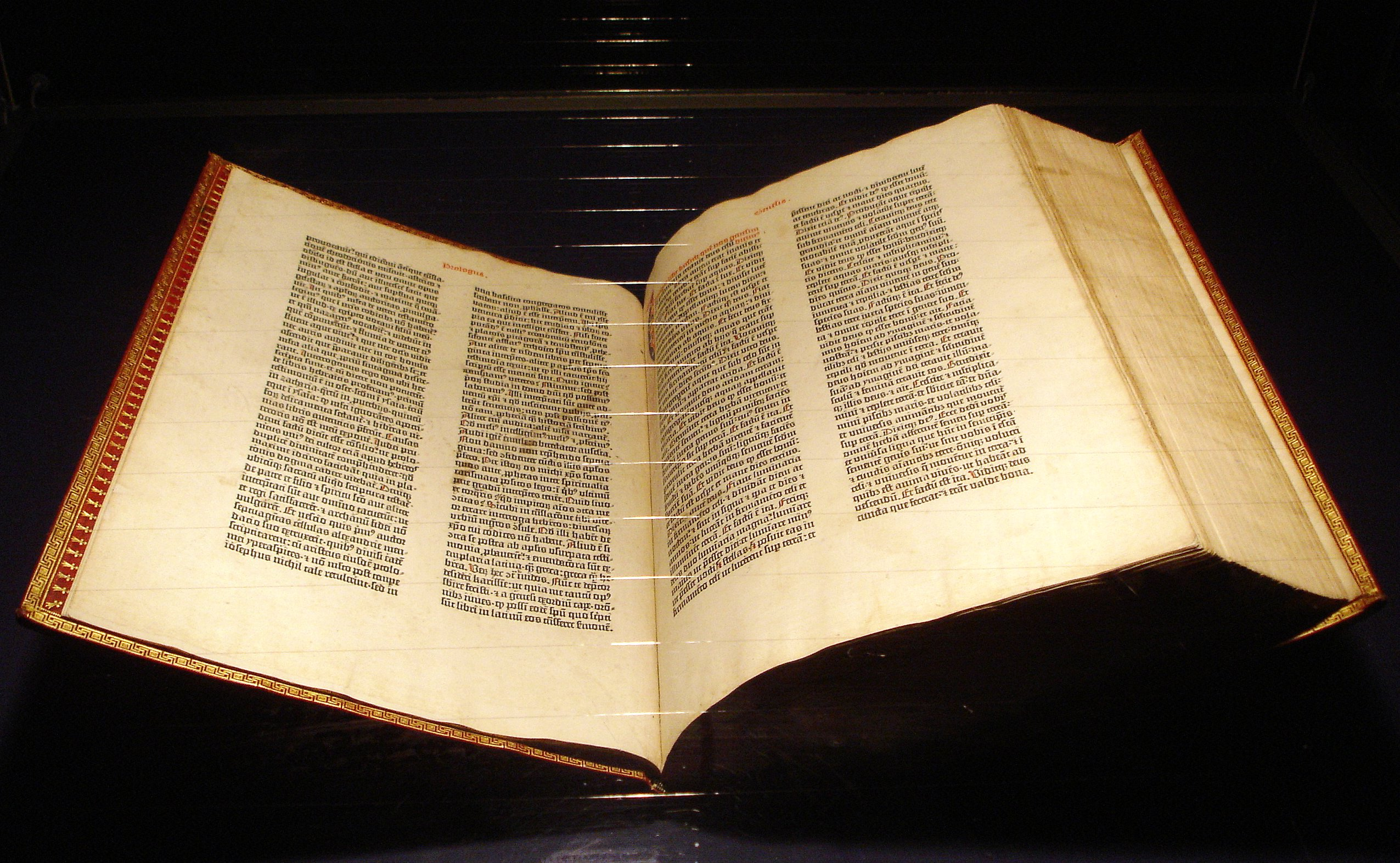 La primera obra impresa por Gutenberg, una biblia, en el museo de Mainz.